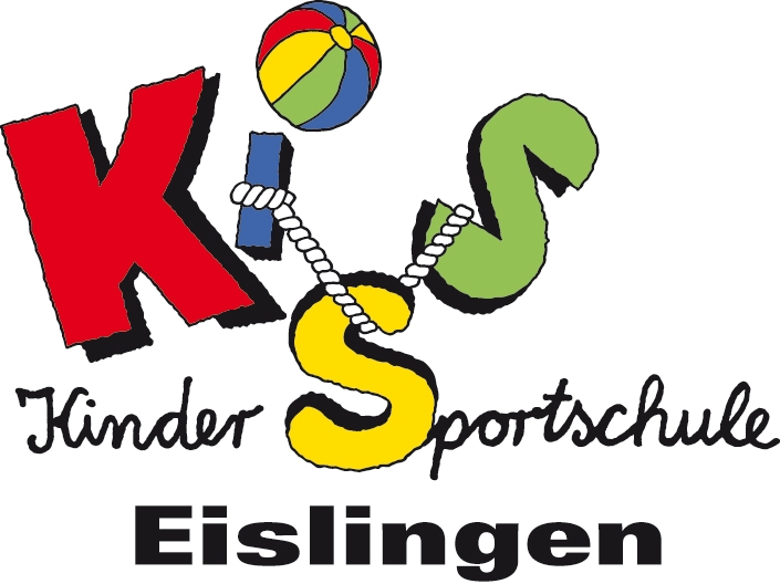 Logo der KiSS Eislingen